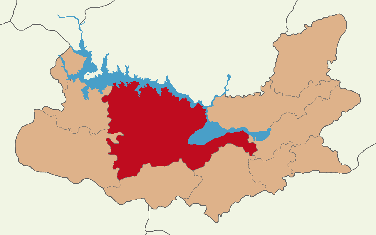 Elazığ Merkez ilçesinin konumu